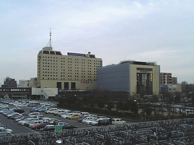 新潟市笹口、プラーカ1・2